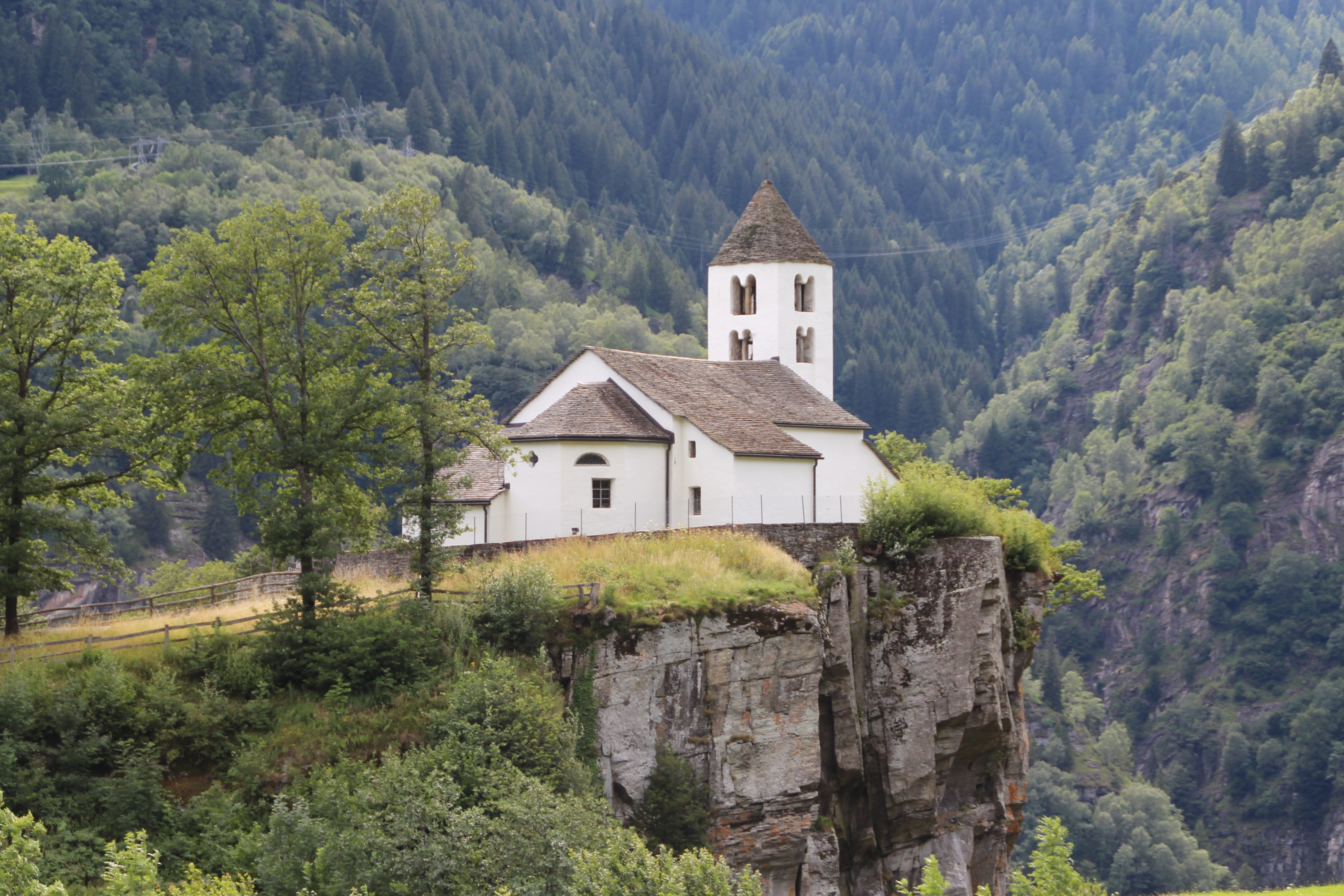 Kirche San Martino (Calonico) Ansicht vom Dorf